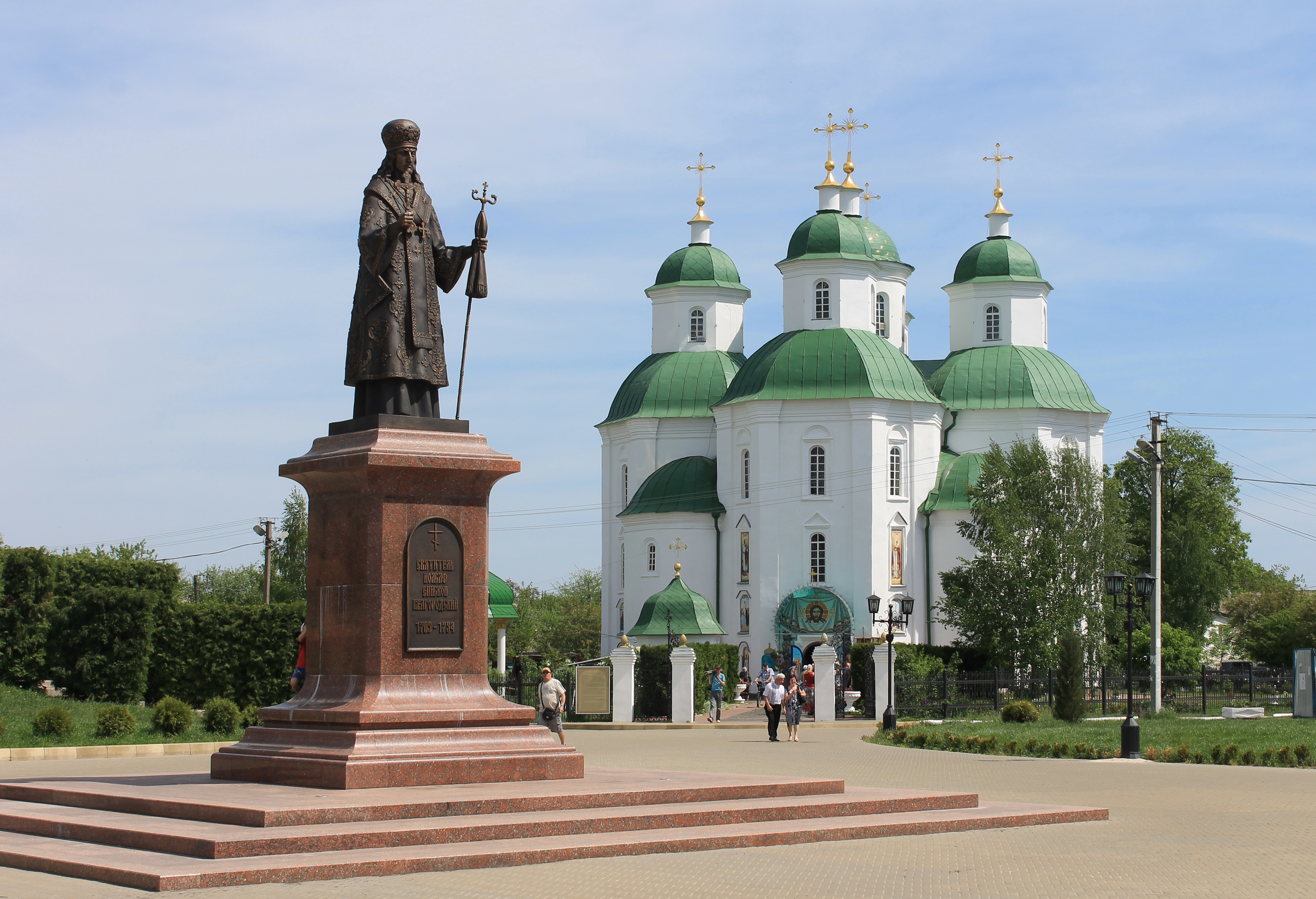 Спасо-Преображенський собор 1705-1720 рр. м.Прилуки